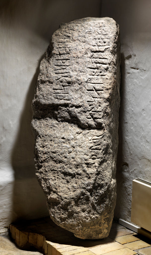 Foto af Roberto Fortuna